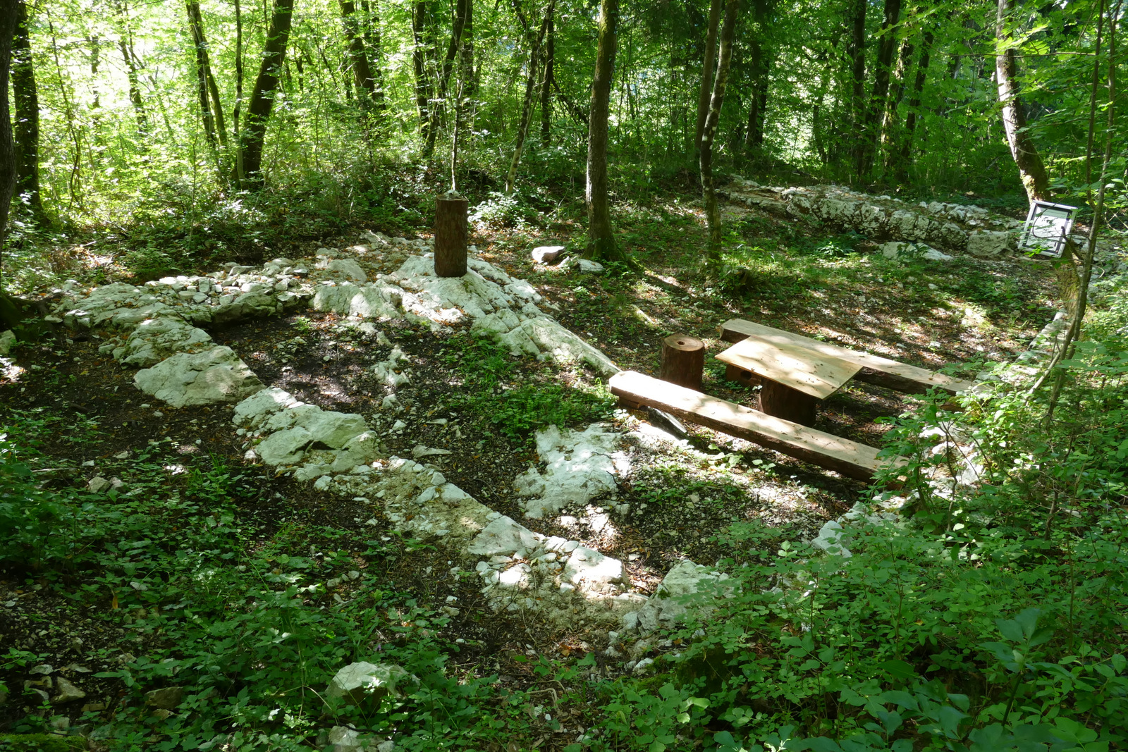 Razvaline gradu Kamen nad Adergasom